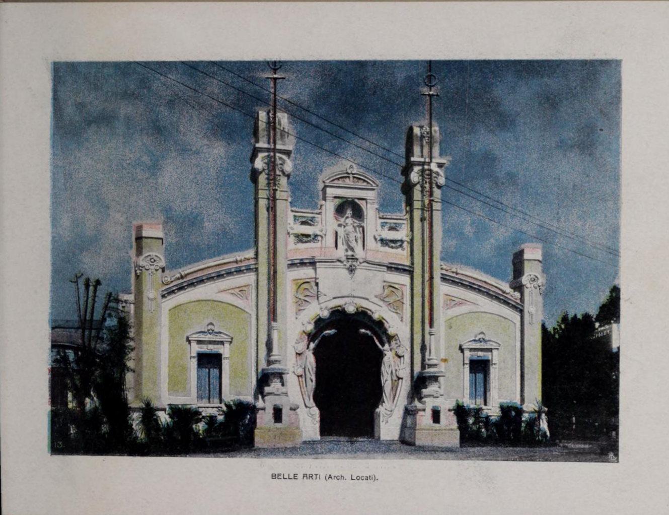 Ingresso della Mostra nazionale di belle arti del 1906, Milano, Expo 1906 (arch. Sebastiano Giuseppe Locati)